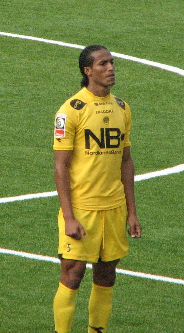 Roy Miller under oppstillingen til BOdø/Glimt-Sogndal